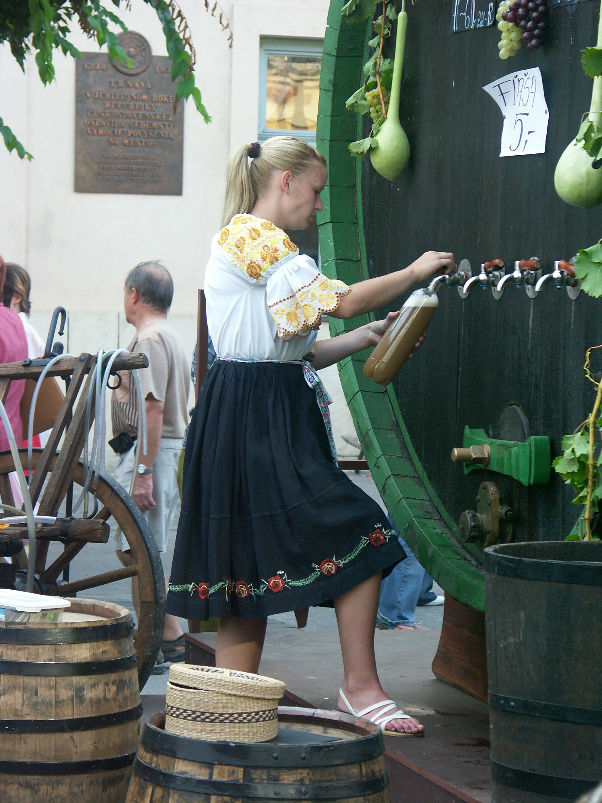 Česky: Nalévání burčáku na Slovensku